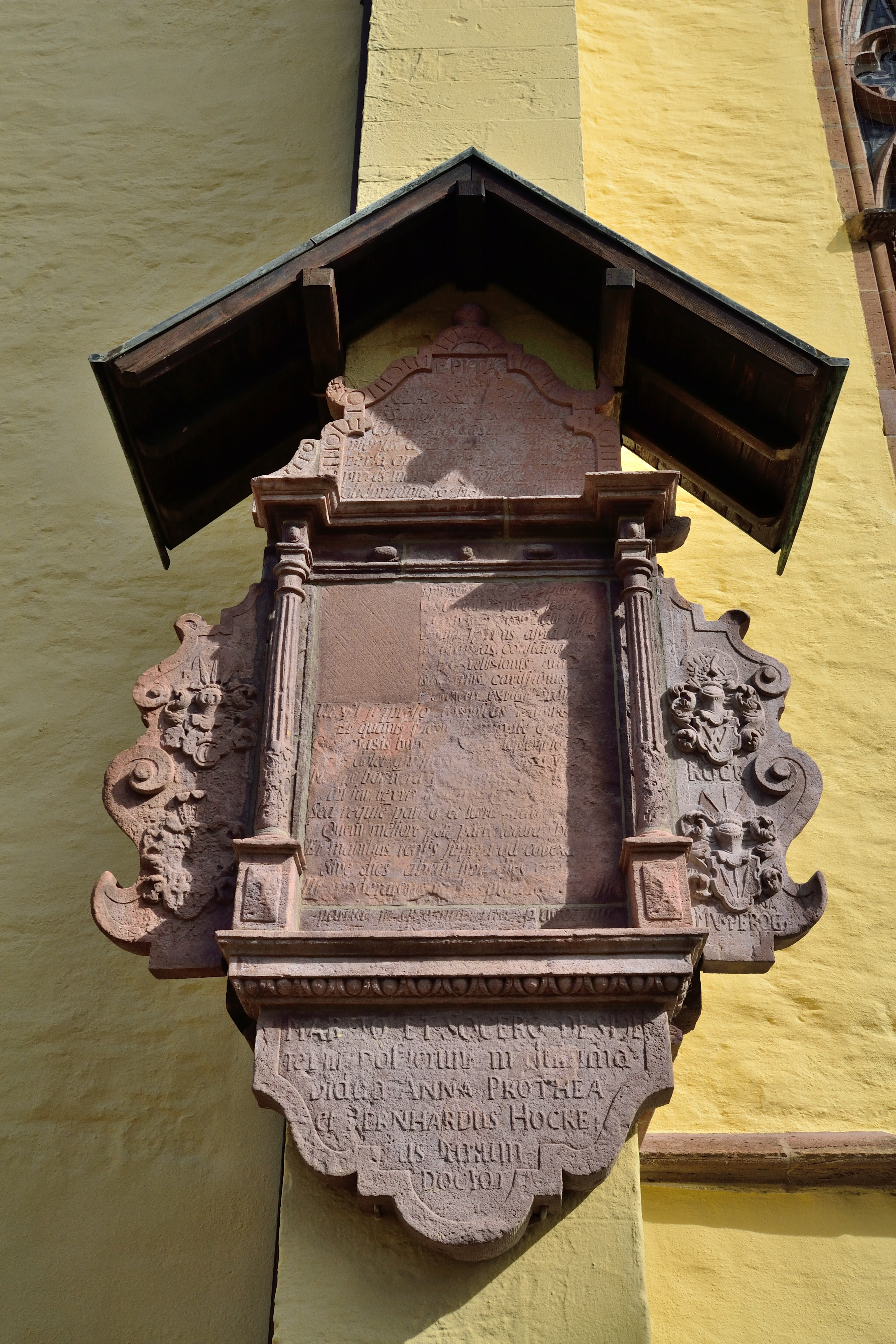 evangelisch-lutherische Kirche St. Nicolai in Lemgo